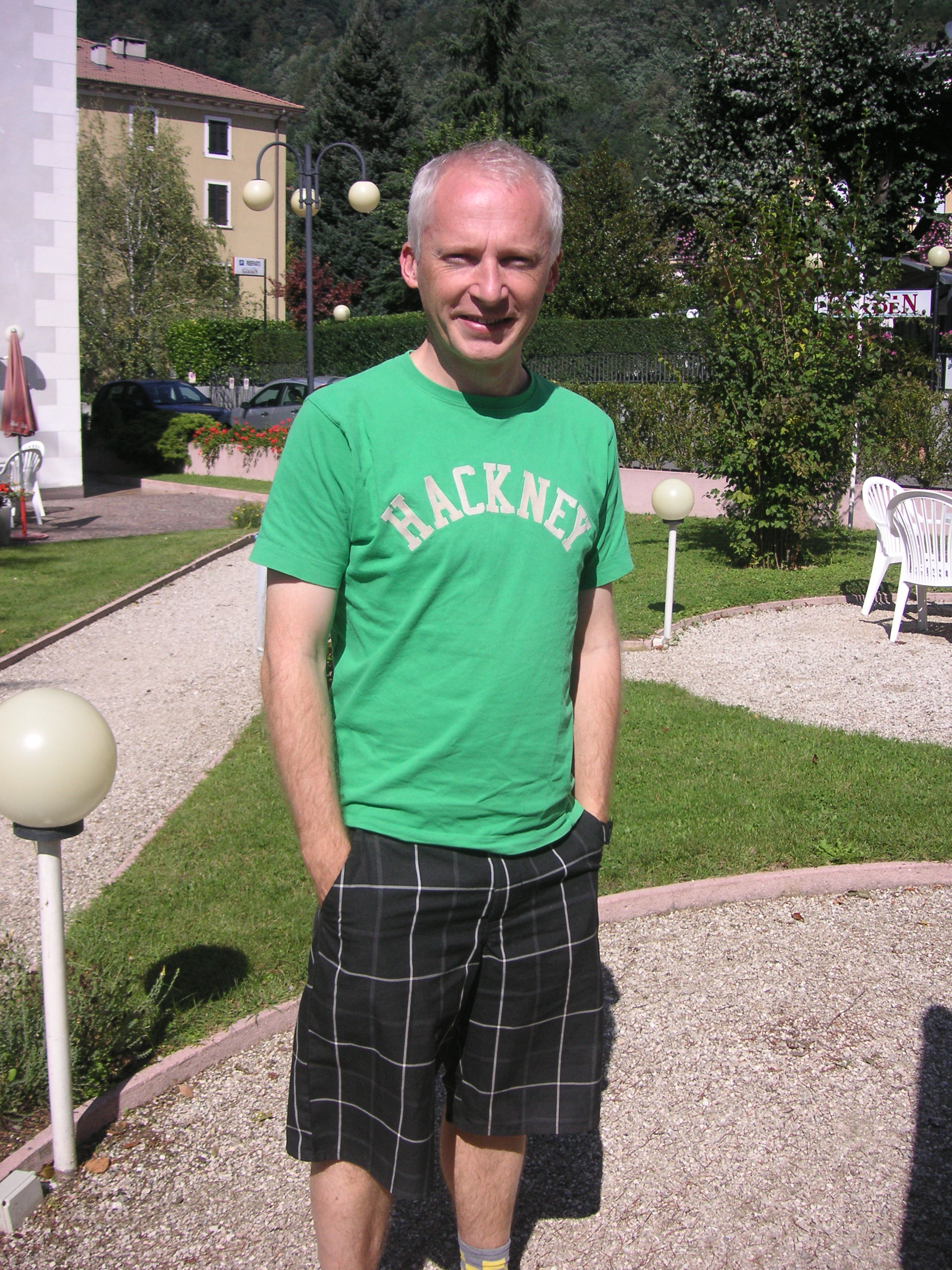 Marcus du Sautoy a Levico Terme per un convegno